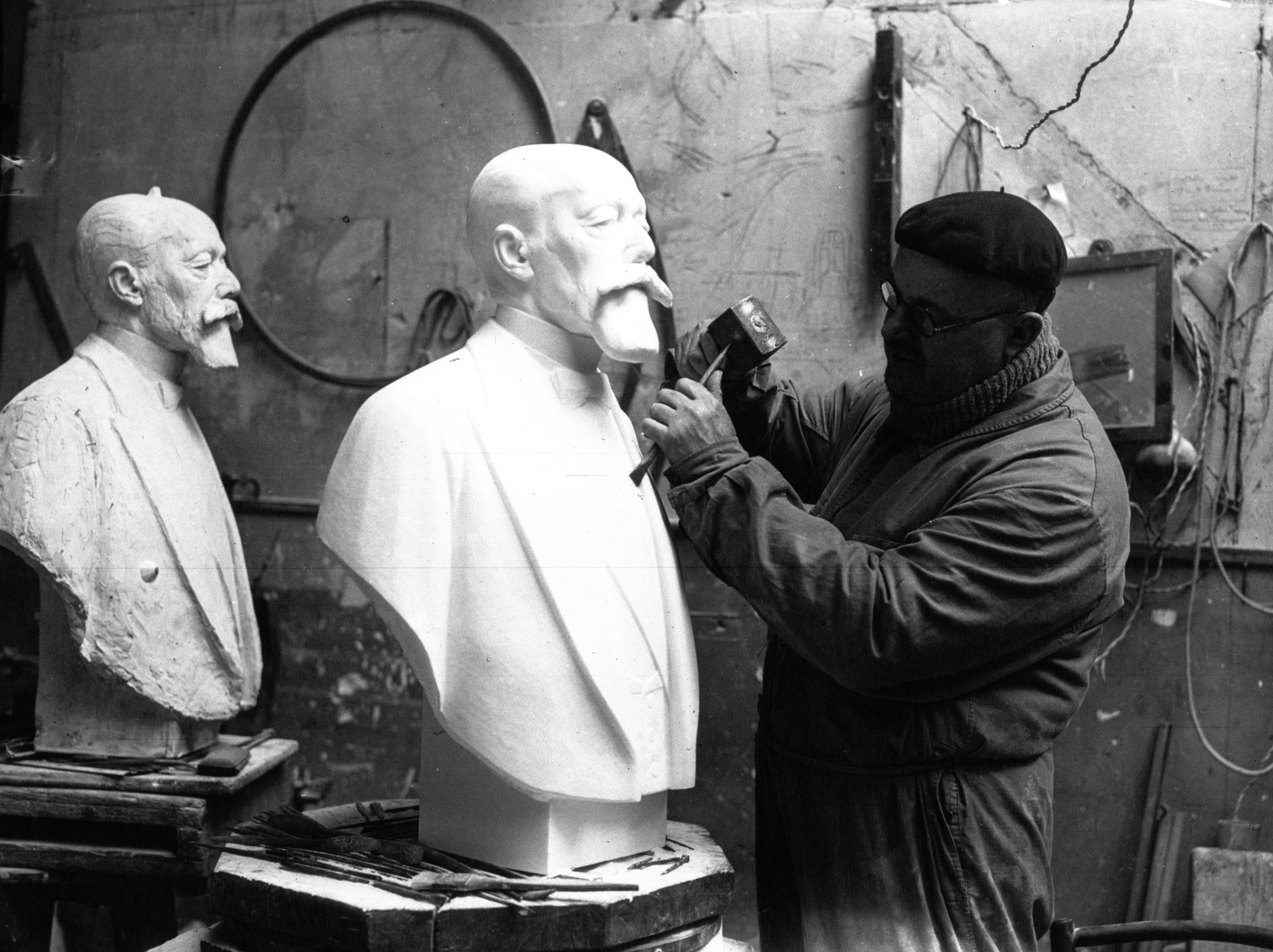 Le sculpteur Descatoire terminant un buste du président Paul Doumer.